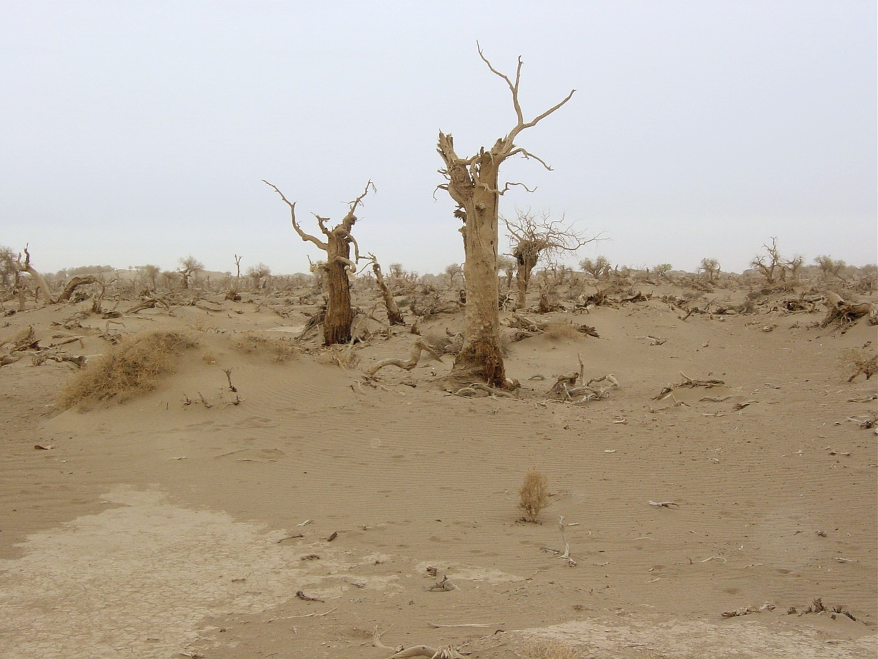 额济那旗怪树林之三